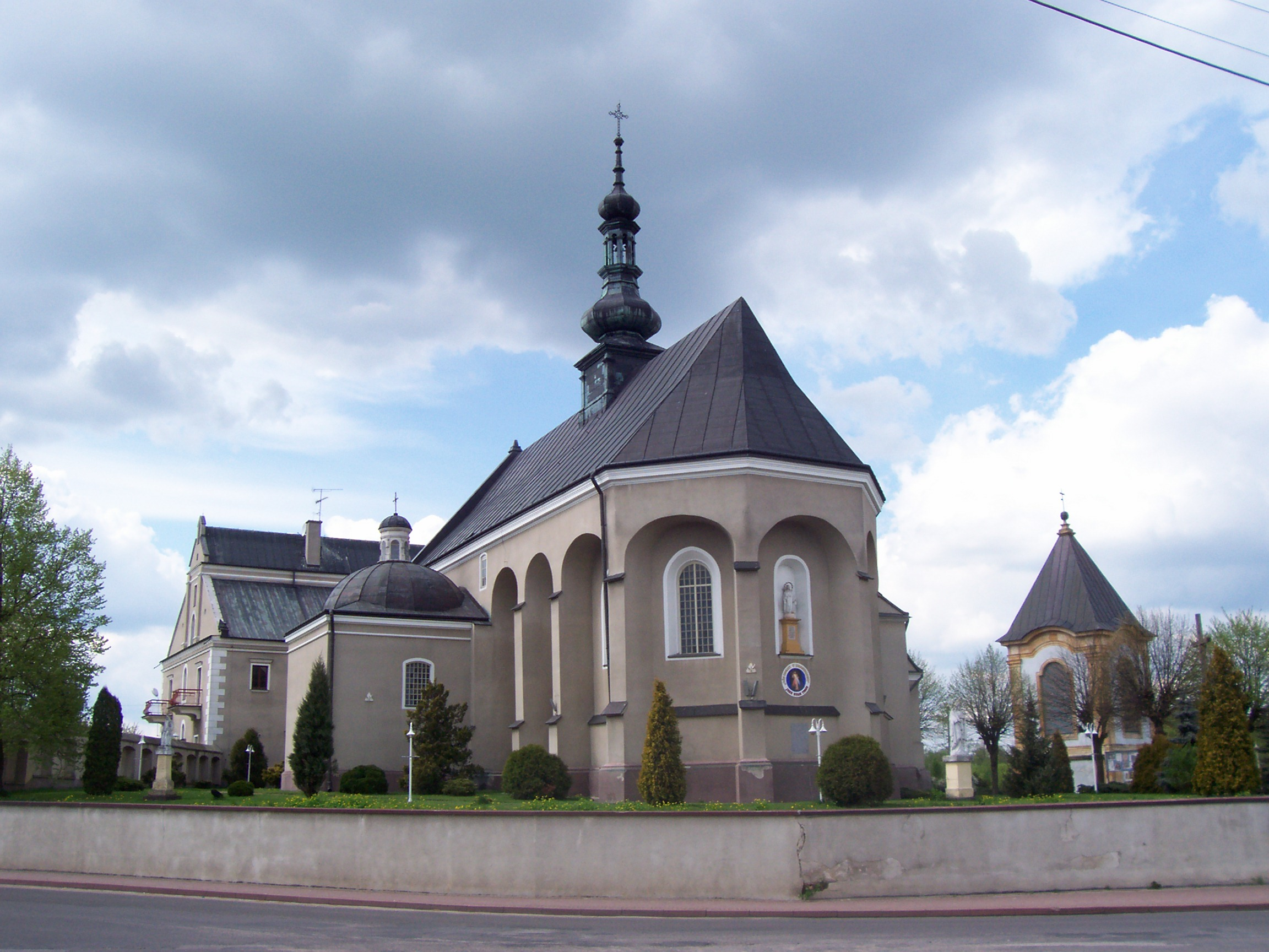 Kościół popauliński w Wielgomłynach